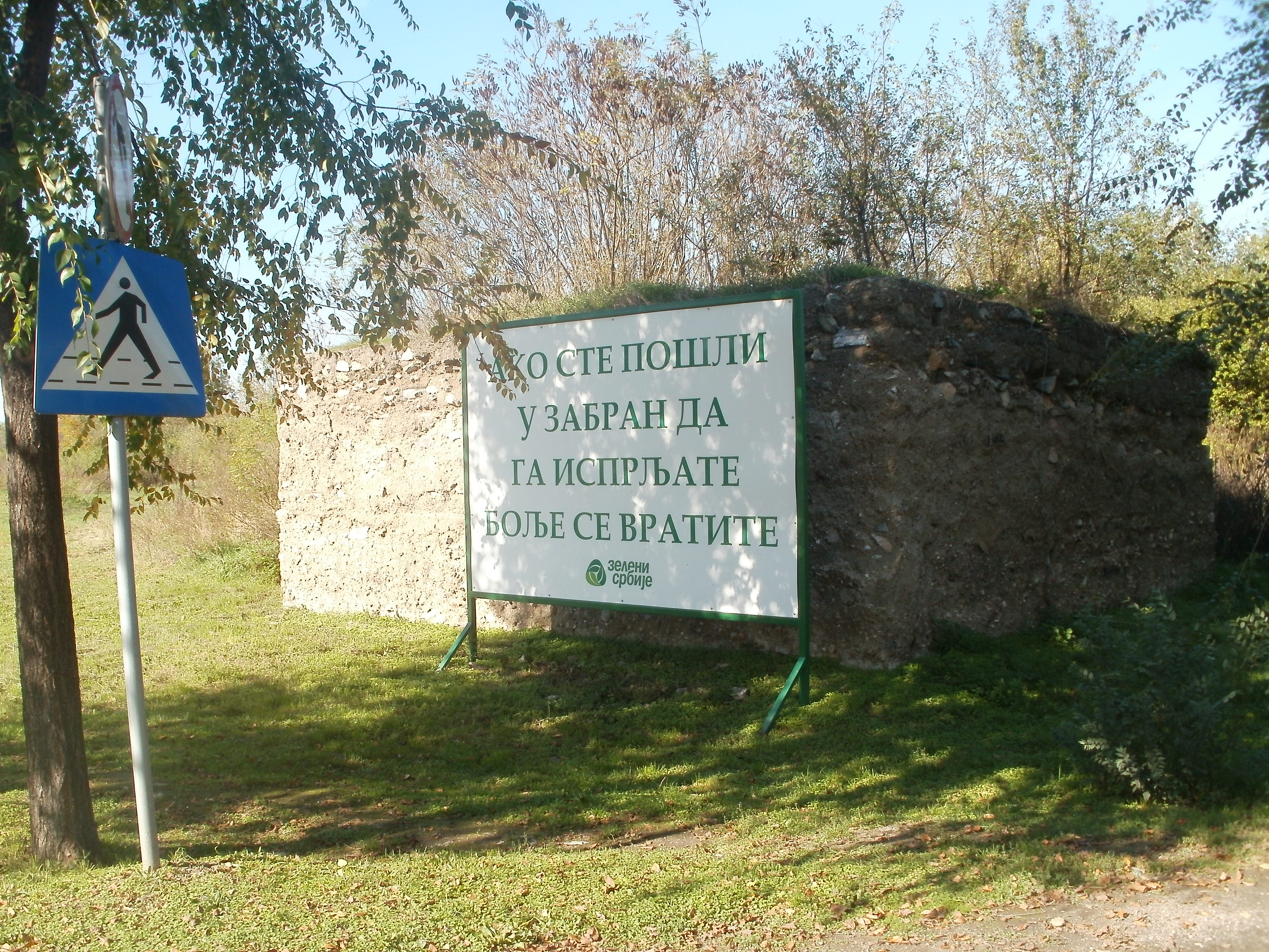 Српски (ћирилица): Улаз у излетшту Забран-Обреновац